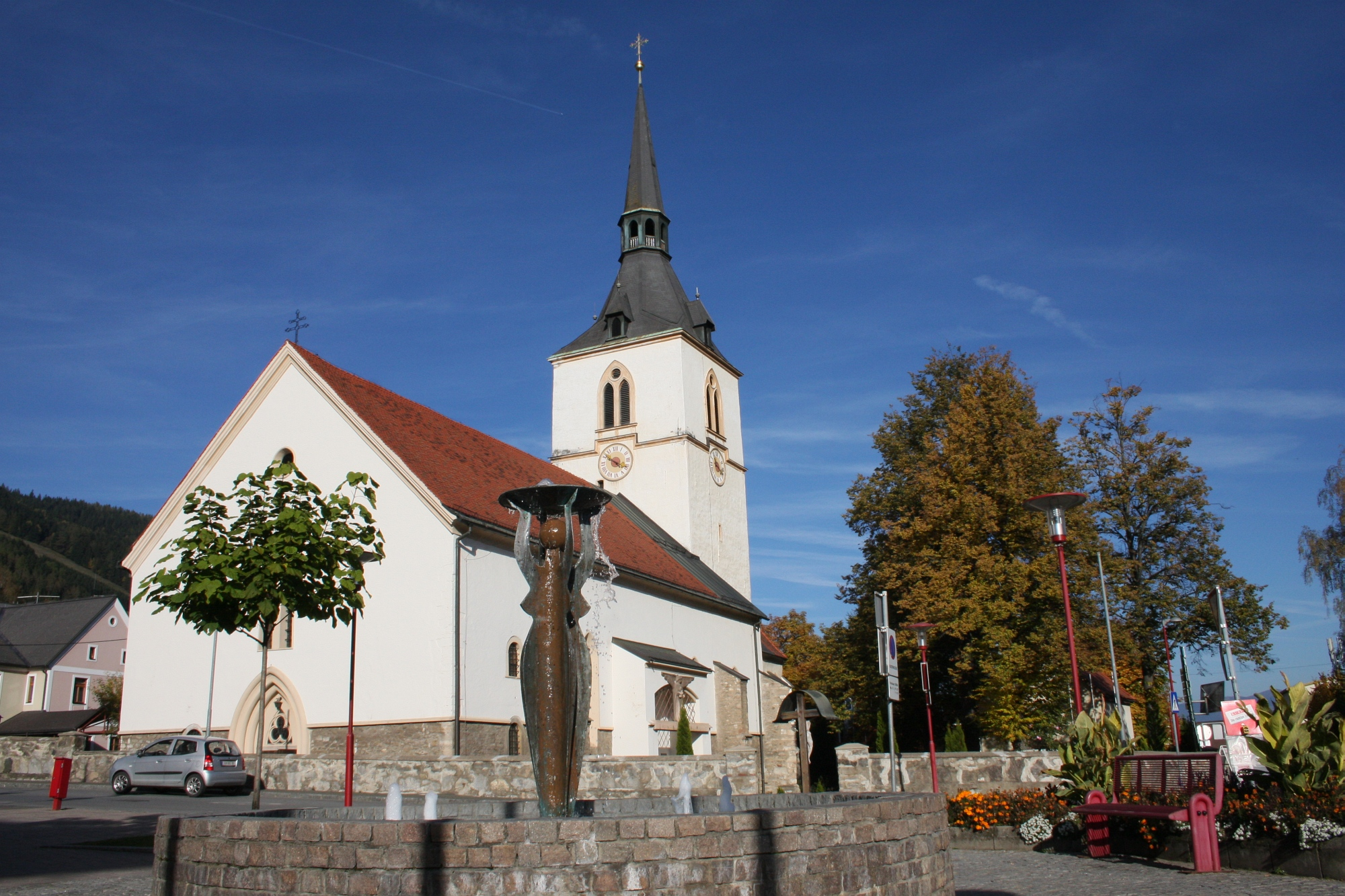 Fohnsdorf, Hauptplatz, Kirche, Brunnen mit mittiger Statue weiblich eine Schale überkopf tragend, Künstler zum Brunnen nicht genannt